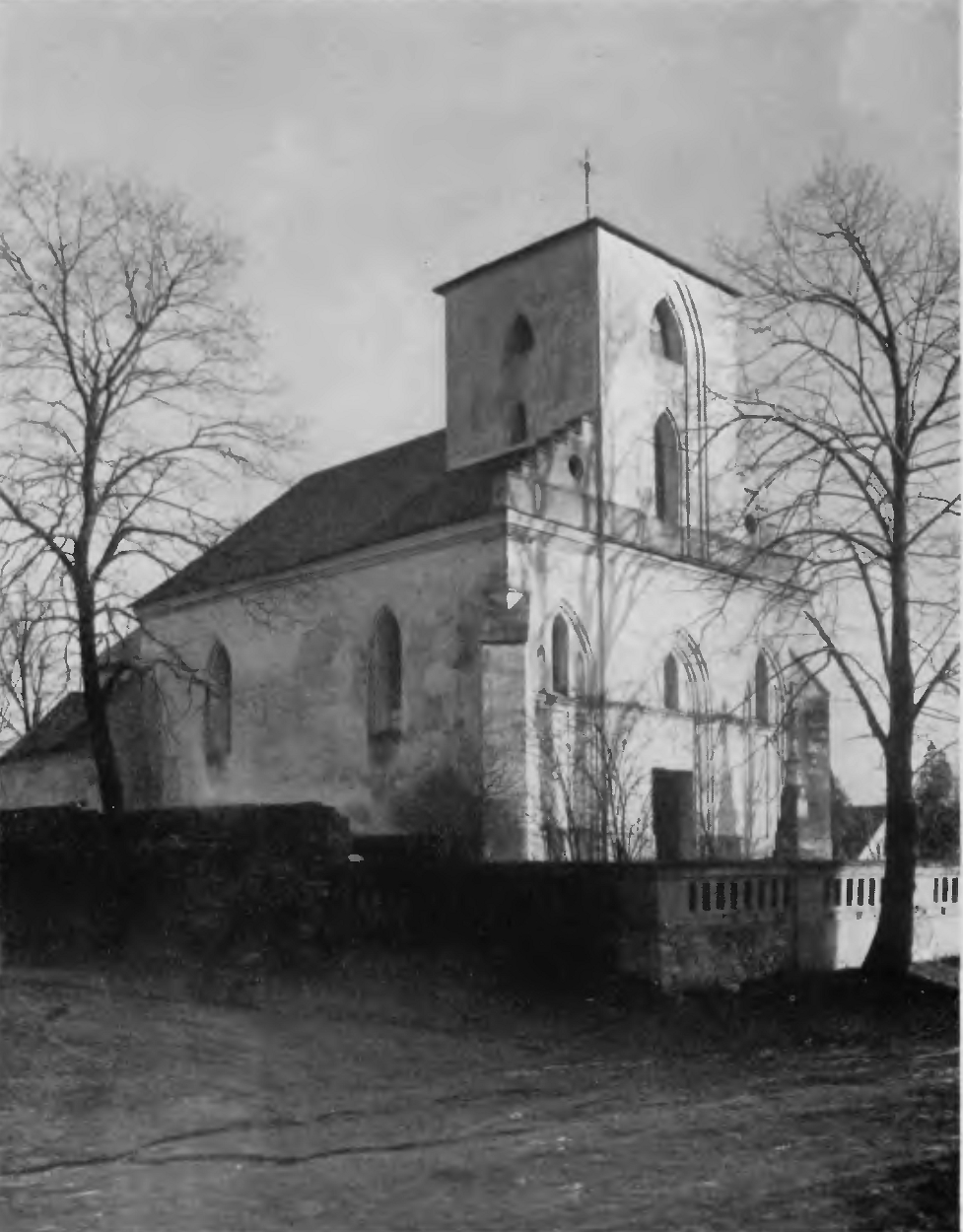 Die Kirche in Salesche. Erbaut um 1800.